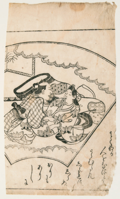 Hishikawa Moronobu Uchiwae zukushi (Raccolta di ventagli). 1684 c. Obon. Sumi-e. Collezione privata.